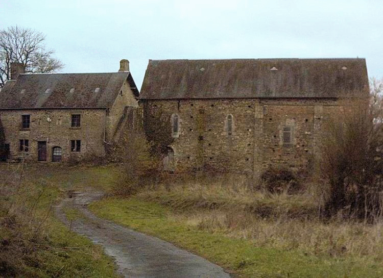 Commanderie Templière de Courval (Calvados). Logis et chapelle.